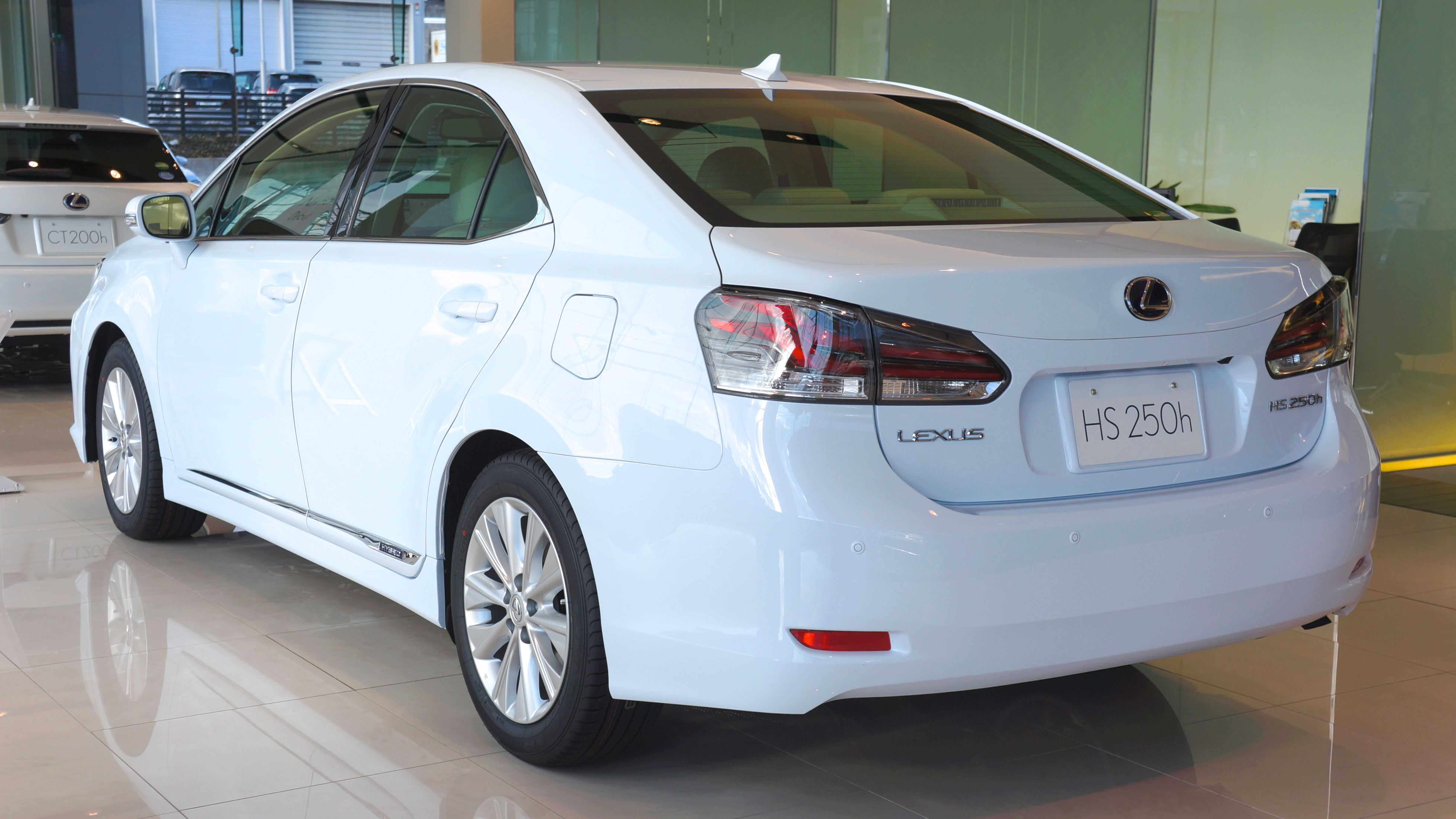 LEXUS HS250h 2013 rear japan